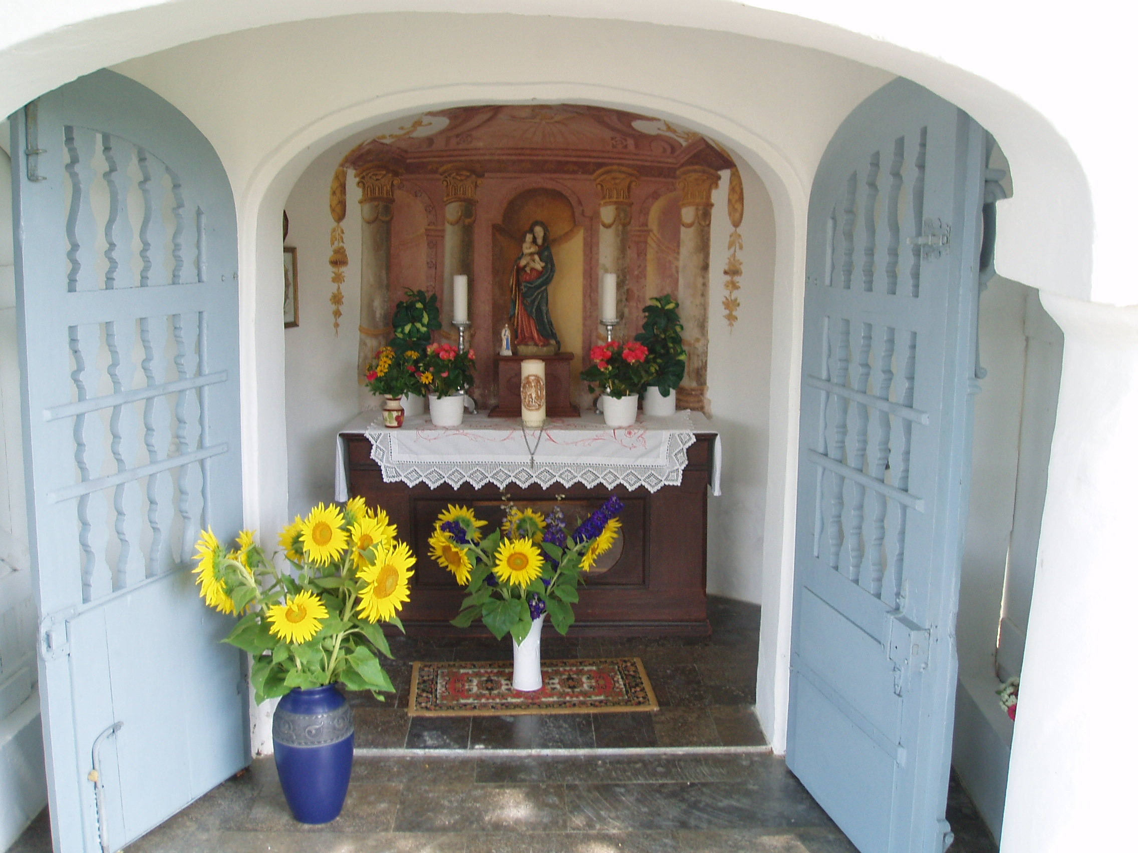 Geöffnete Feldkapelle Mariahilf Edenbergen am Feldgottesdienst zu Mariä Himmelfahrt